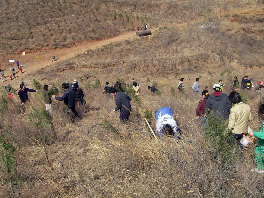 3月12日是中国的植树节，人们在植树。摄于北京顺义